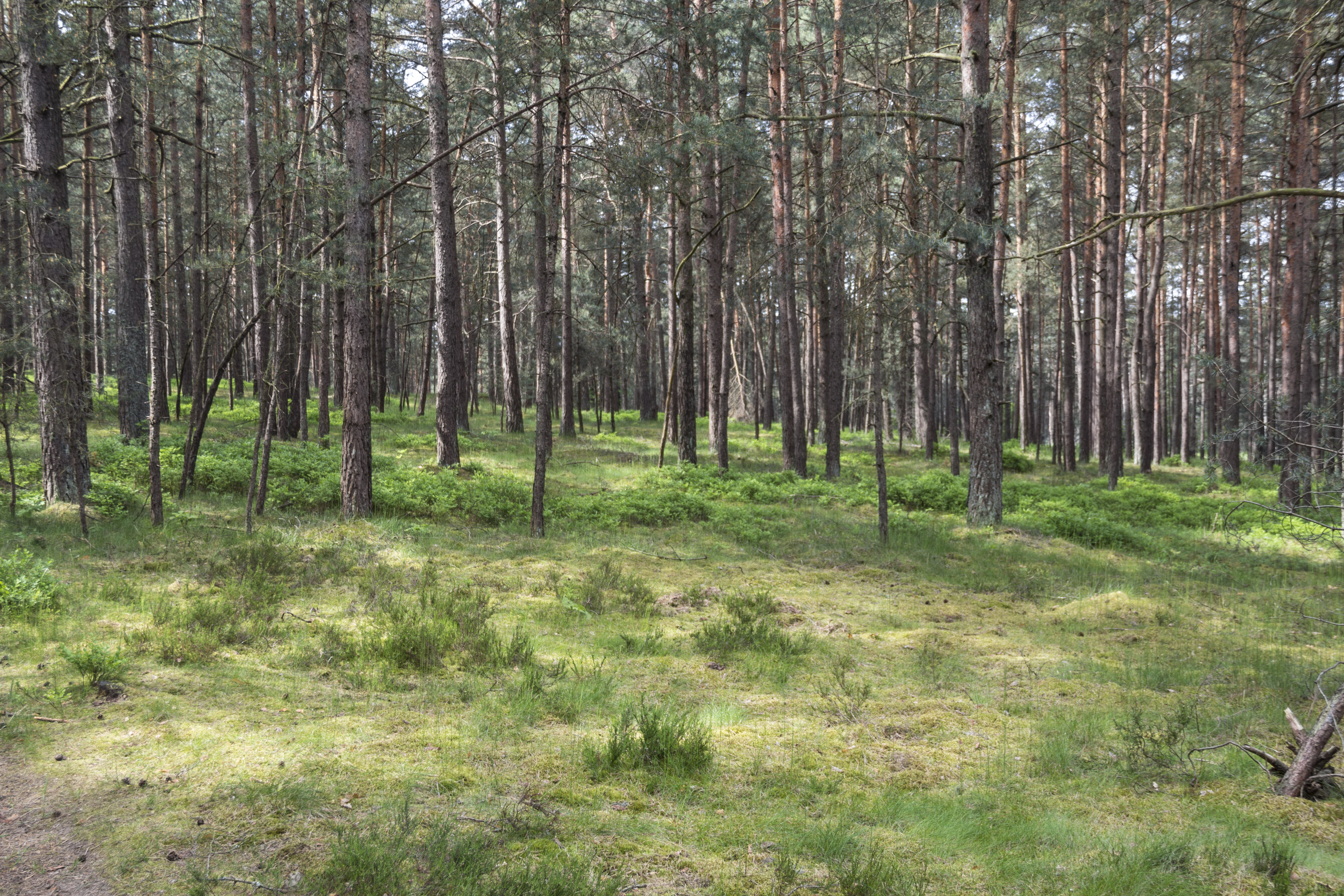 Naturschutzgebiet, Neumarkt in der Oberpfalz, Neumarkter Sanddünen